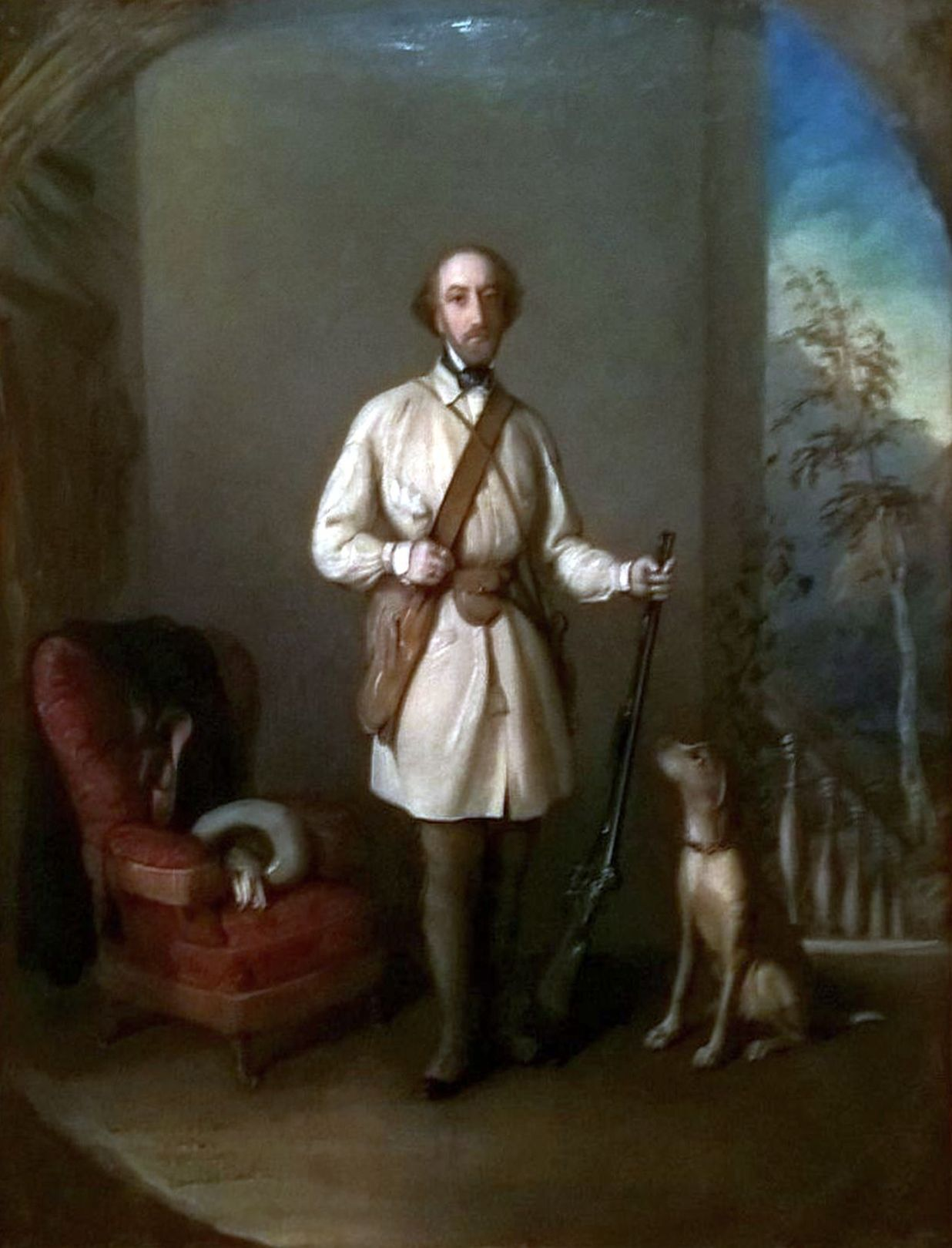 Constantin Daniel Rosenthal - Portretul lui Nicolae Golescu - Muzeul Naţional de Artă al României - Bucureşti, ulei pe pânză